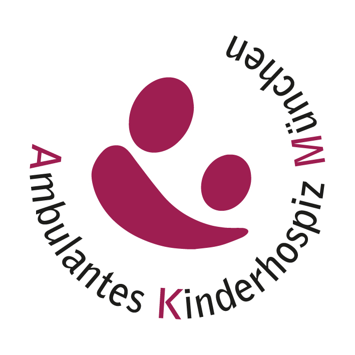 Stiftung Ambulantes Kinderhospiz München